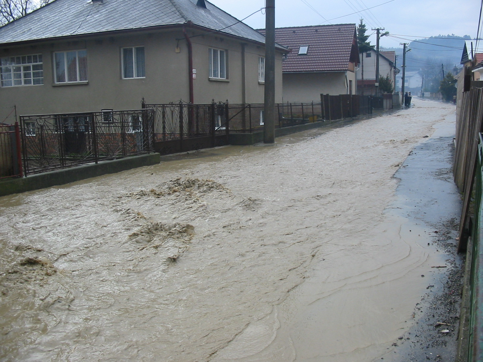 Družstevná pri Hornáde / Varovec počas dažďa